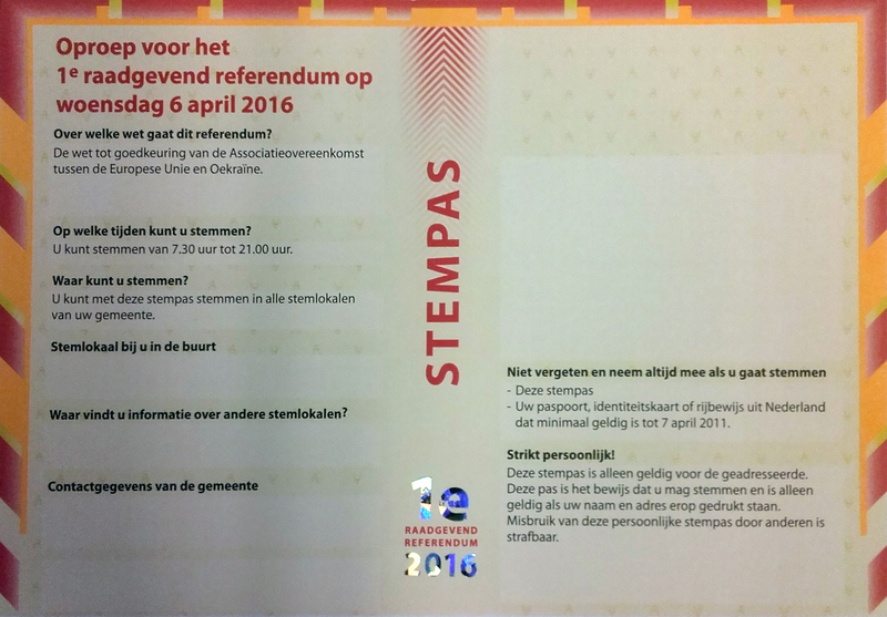 Wahlschein (stempas) zum Referendum in den Niederlanden über das Assoziierungsabkommen zwischen der Europäischen Union und der Ukraine